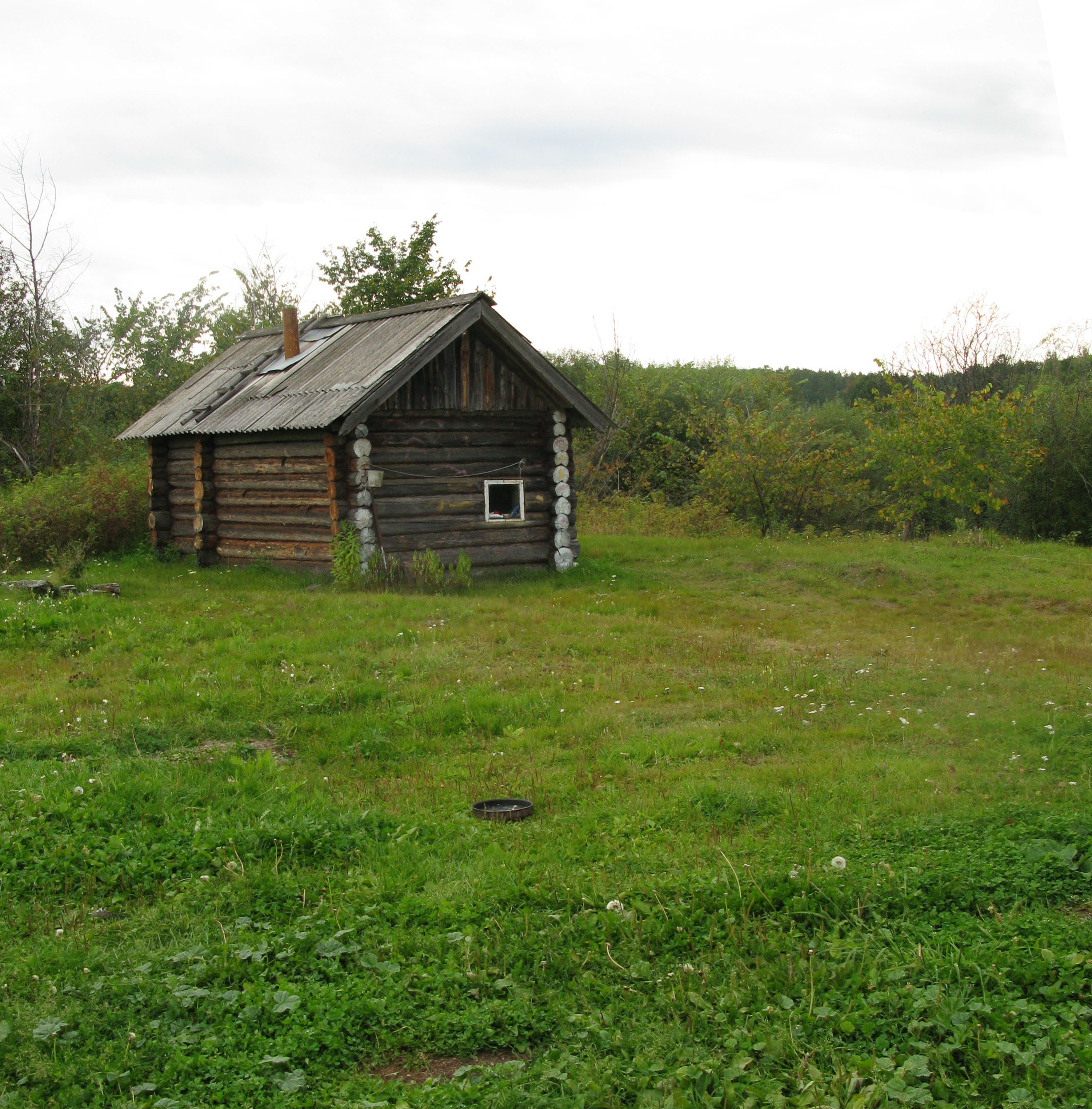 Вид на место старого моста летом